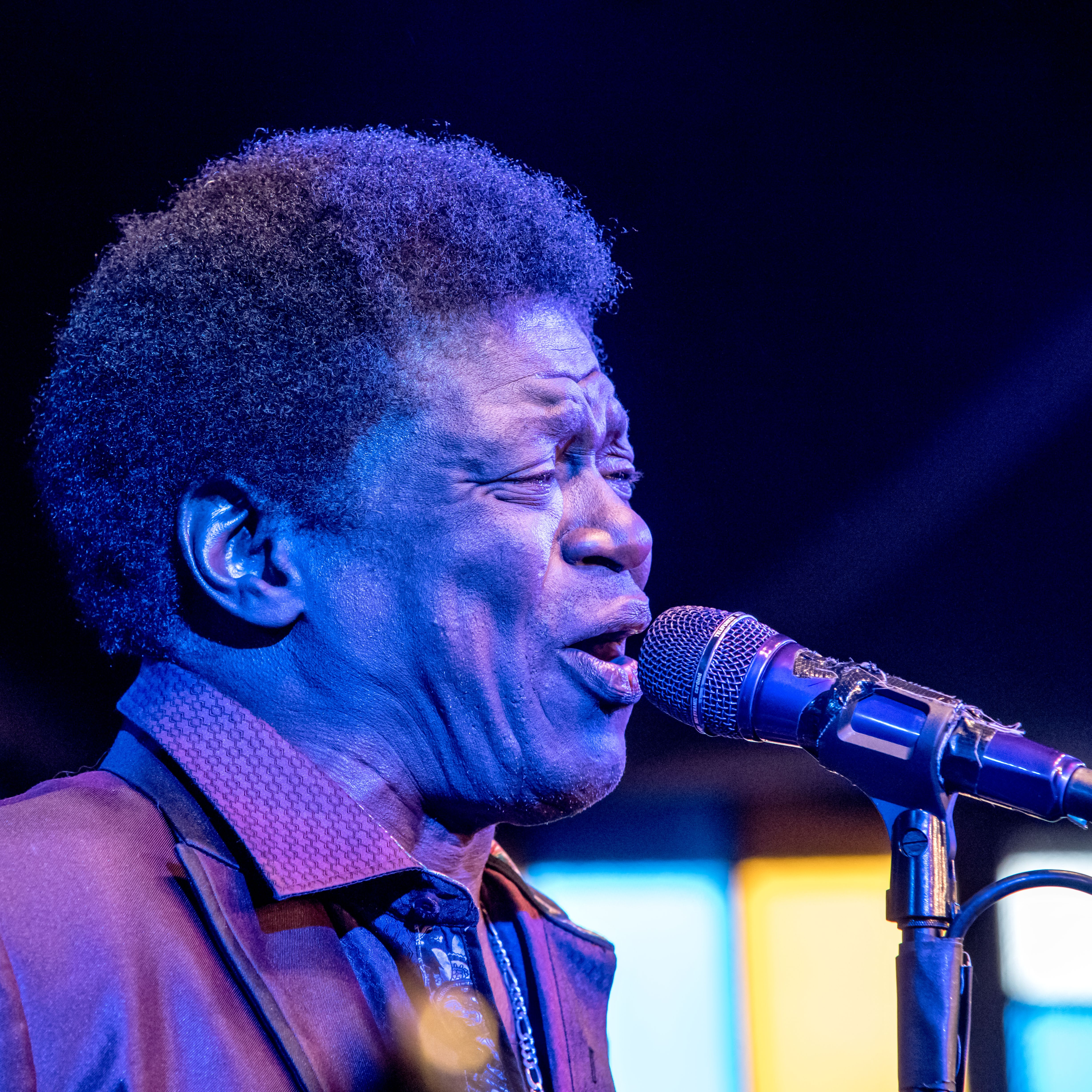 Bilder vom Zelt Musik Festival 2016 in Freiburg im Breisgau Der Soulsänger Charles Bradley